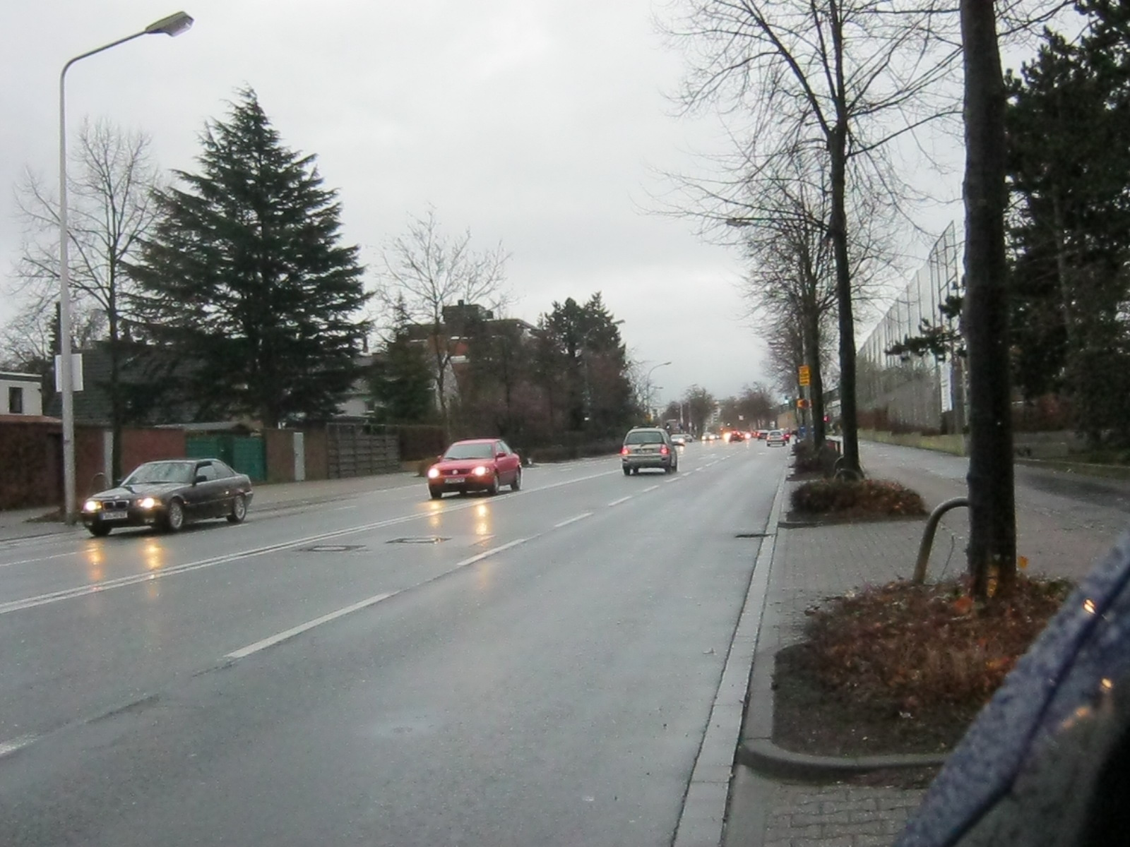 Euskirchener Street in Düren